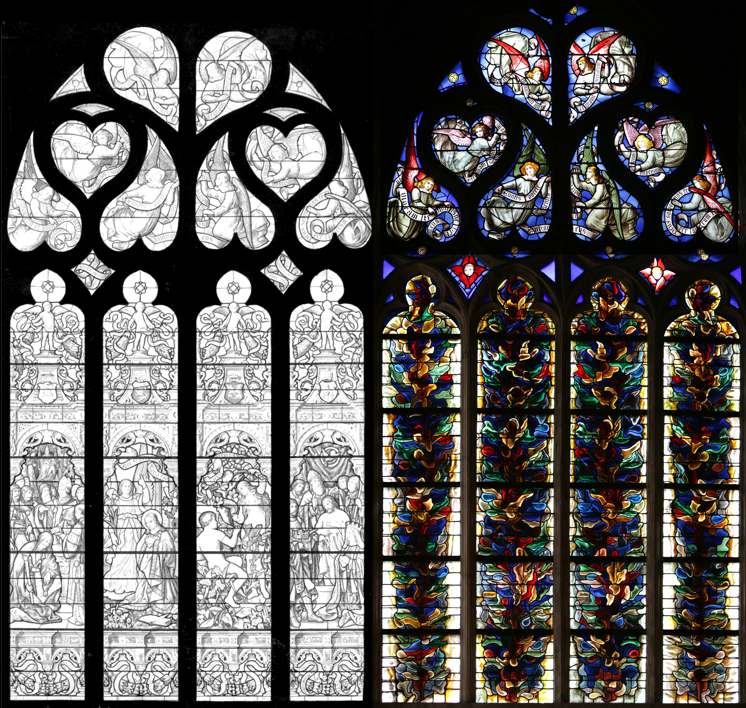 Primatiale Saint Jean. Vitrail des fonts Baptismaux. Dans l'esprit de la Renaissance. Une grande partie détruite en 1945 et bouché par Grüber. Vitrail offert par L.Bégule à L'Archevêque.